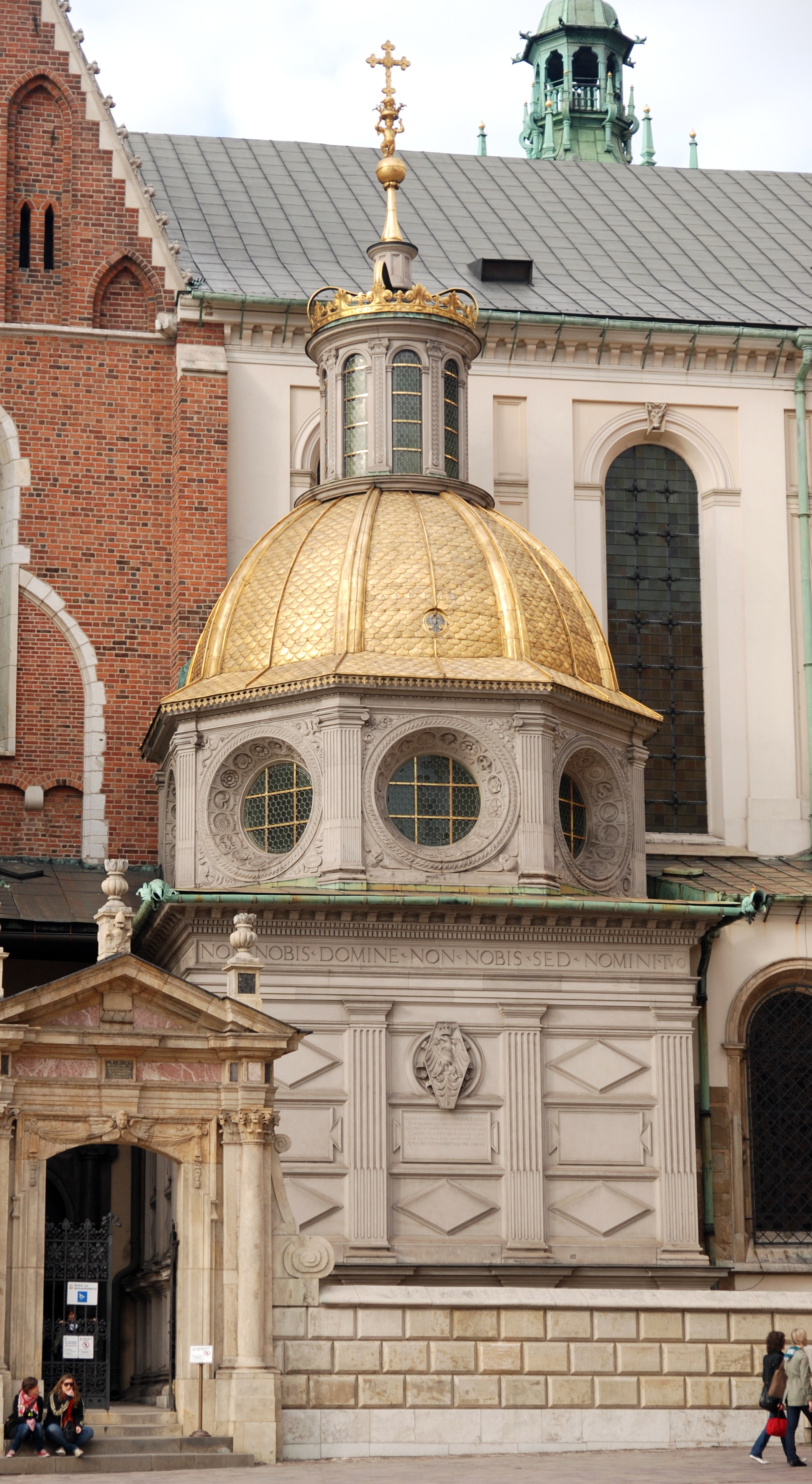 Sigismund Chapel/Kaplica Zygmuntowska, Wawel, Kraków